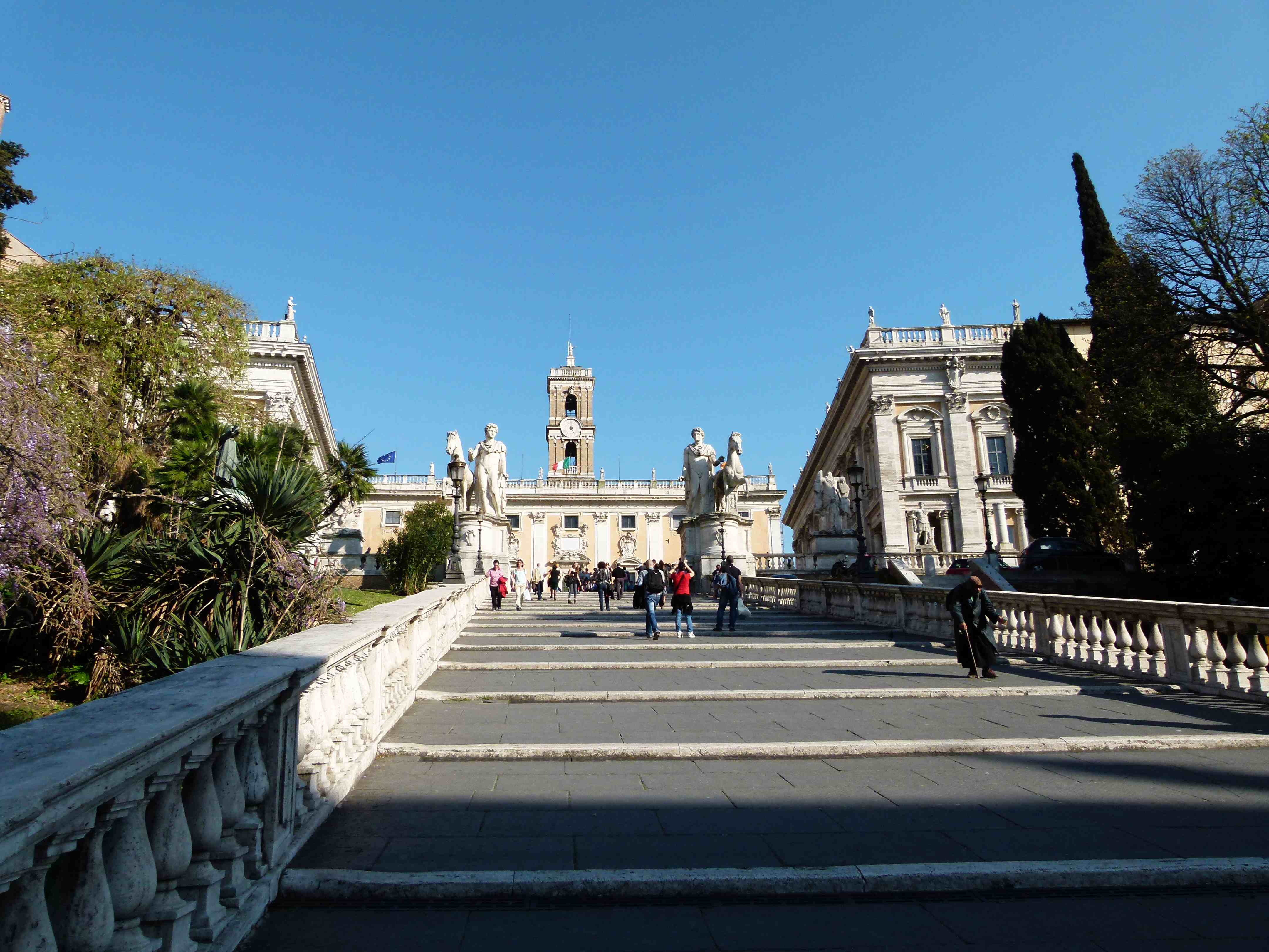 Escalier montant au Capitole, cordonata